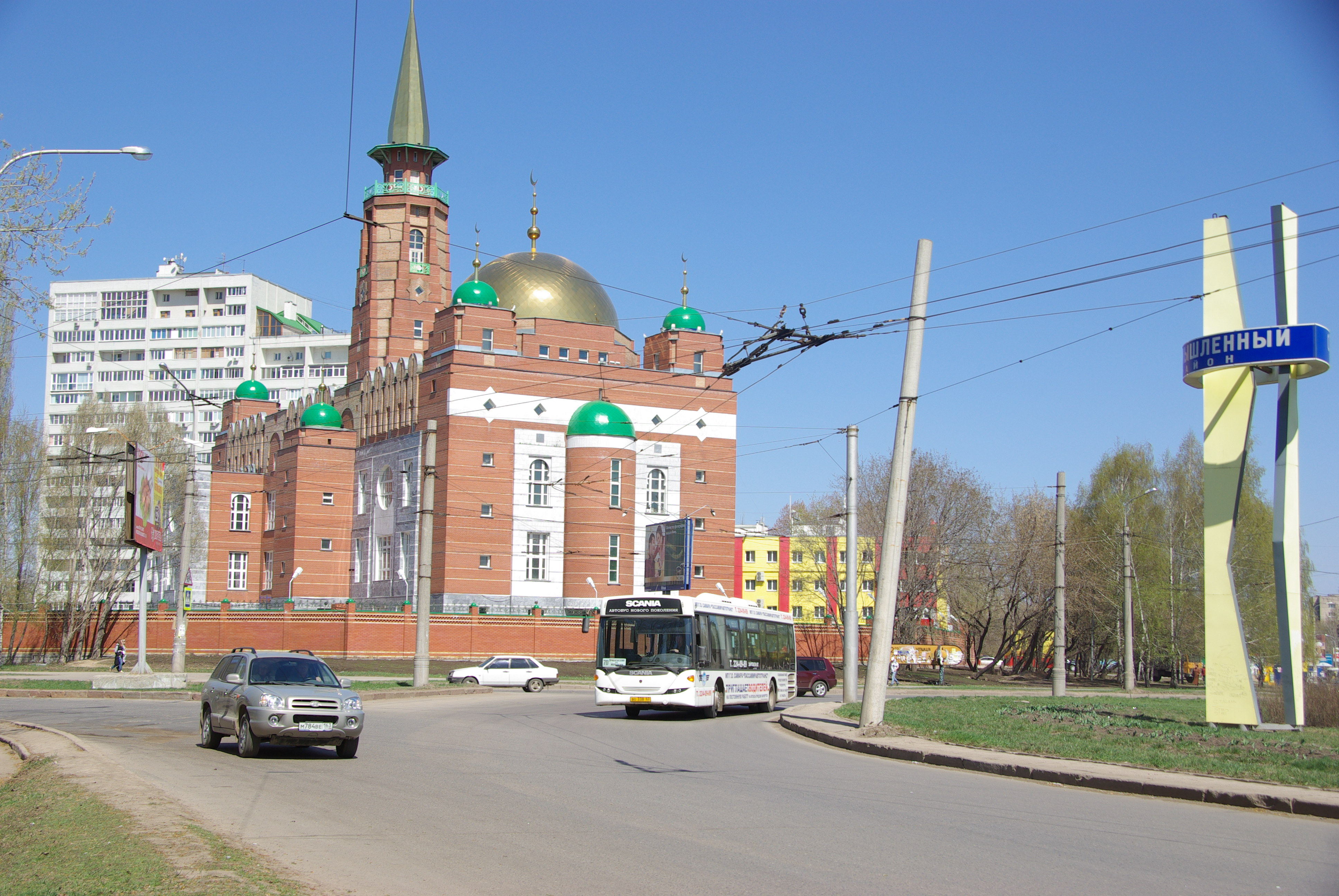 b_20090502_715